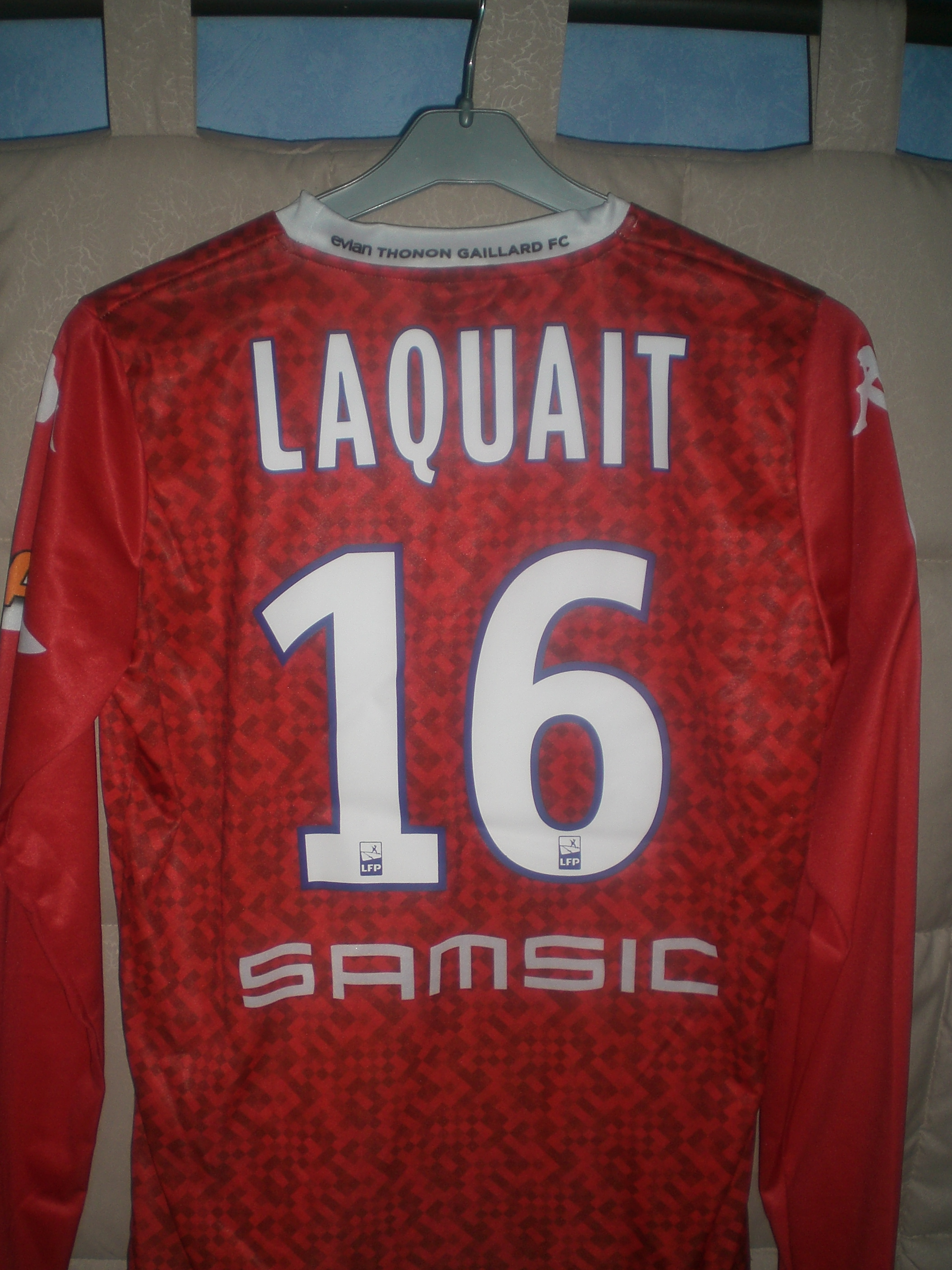 Maillot gardien du club de l'Evian-Thonon-Gaillard FC pour la saison 2013-2014, floqué au nom du joueur Bertrand Laquait.